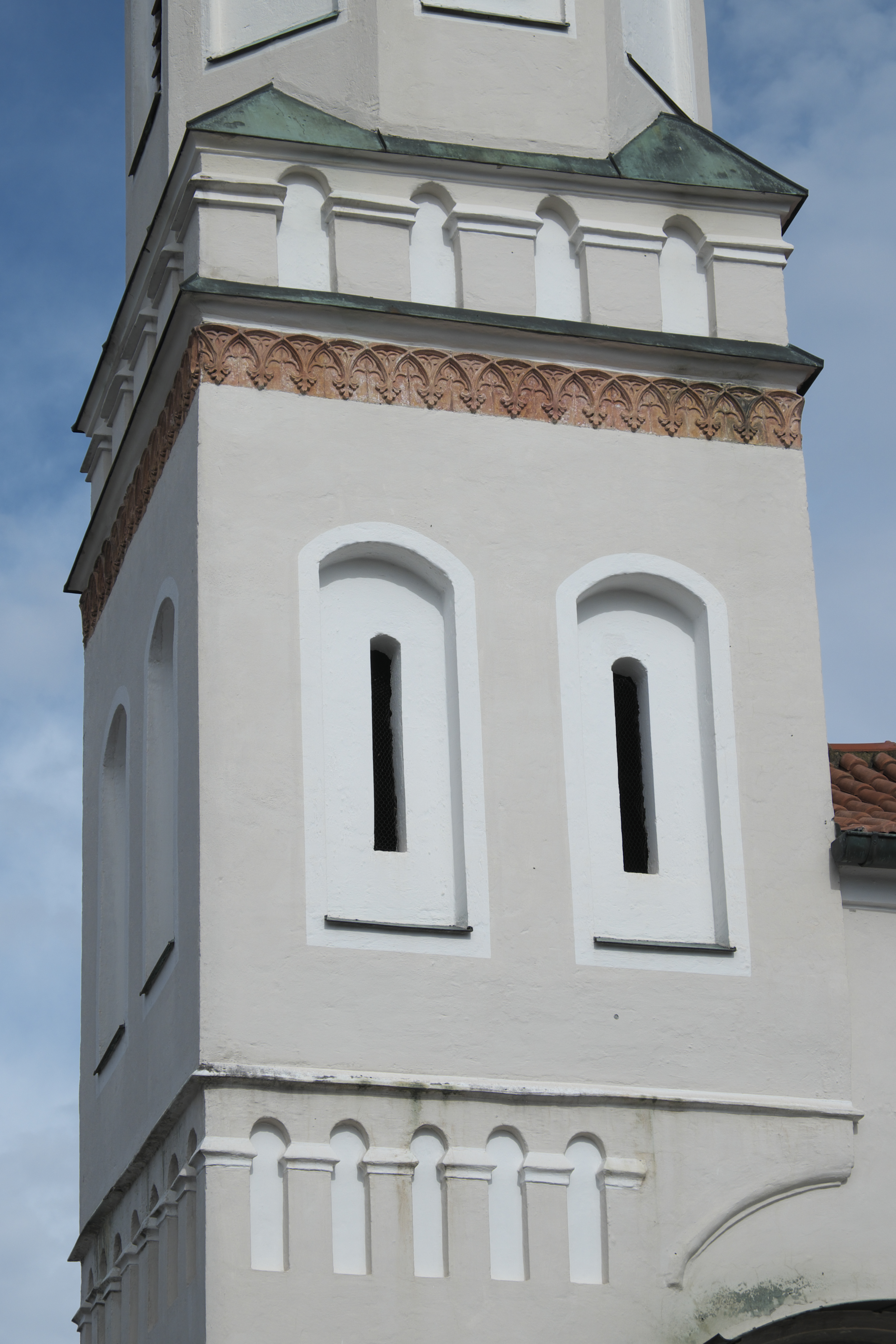 Katholische Friedhofskirche St. Salvator und Sebastian in Weilheim in Oberbayern im Landkreis Weilheim-Schongau (Bayern/Deutschland), Turm